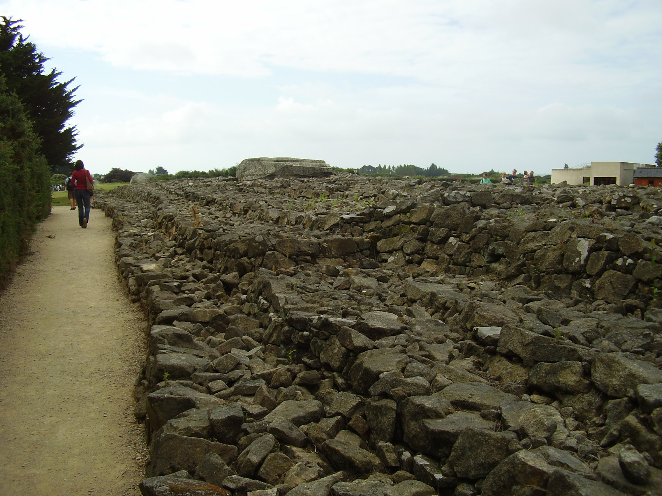 Locmariaquer, Frankreich